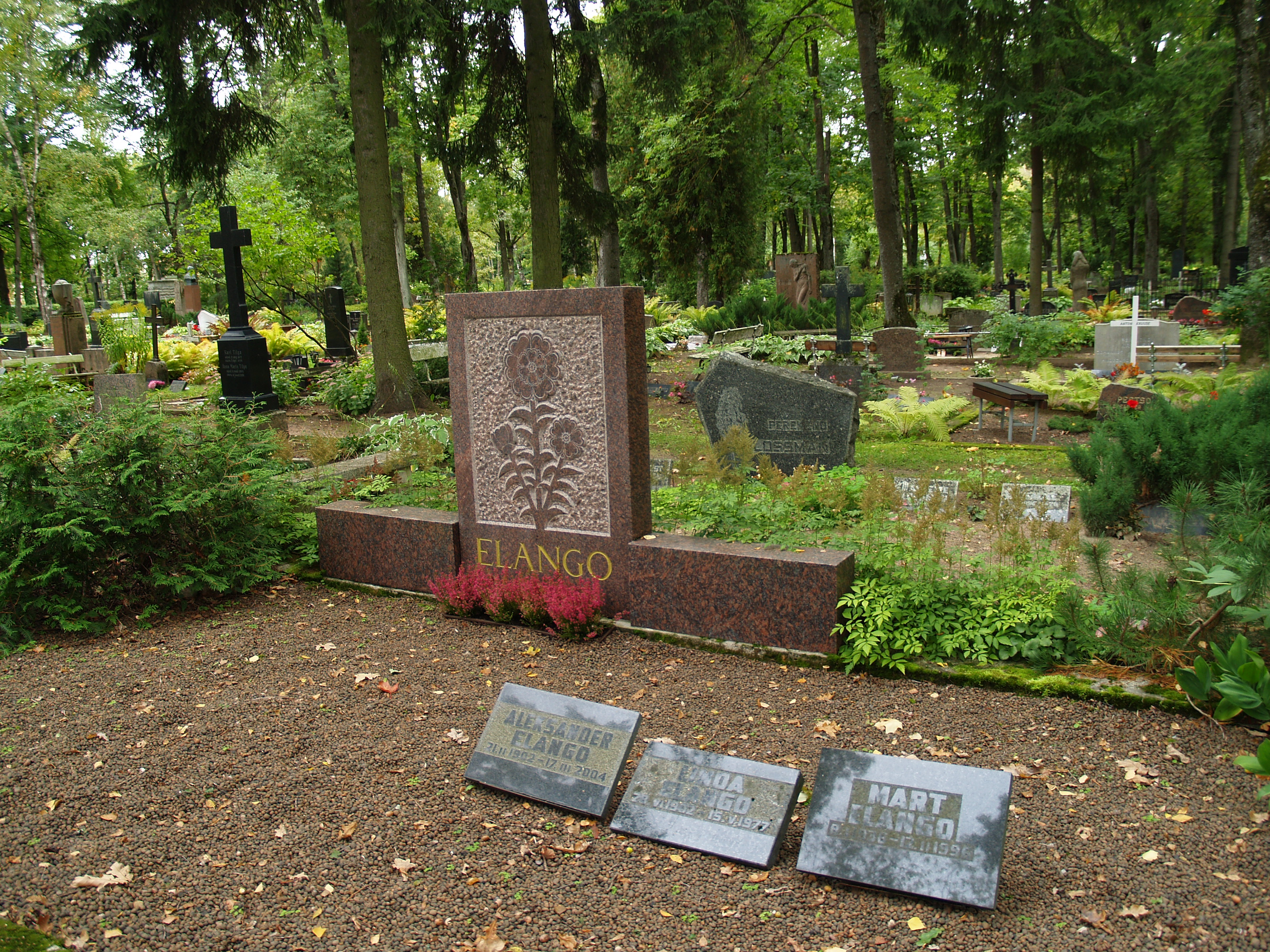 Tartu Pauluse kalmistu. Aleksander Elango haud ja Mart Elango haud.